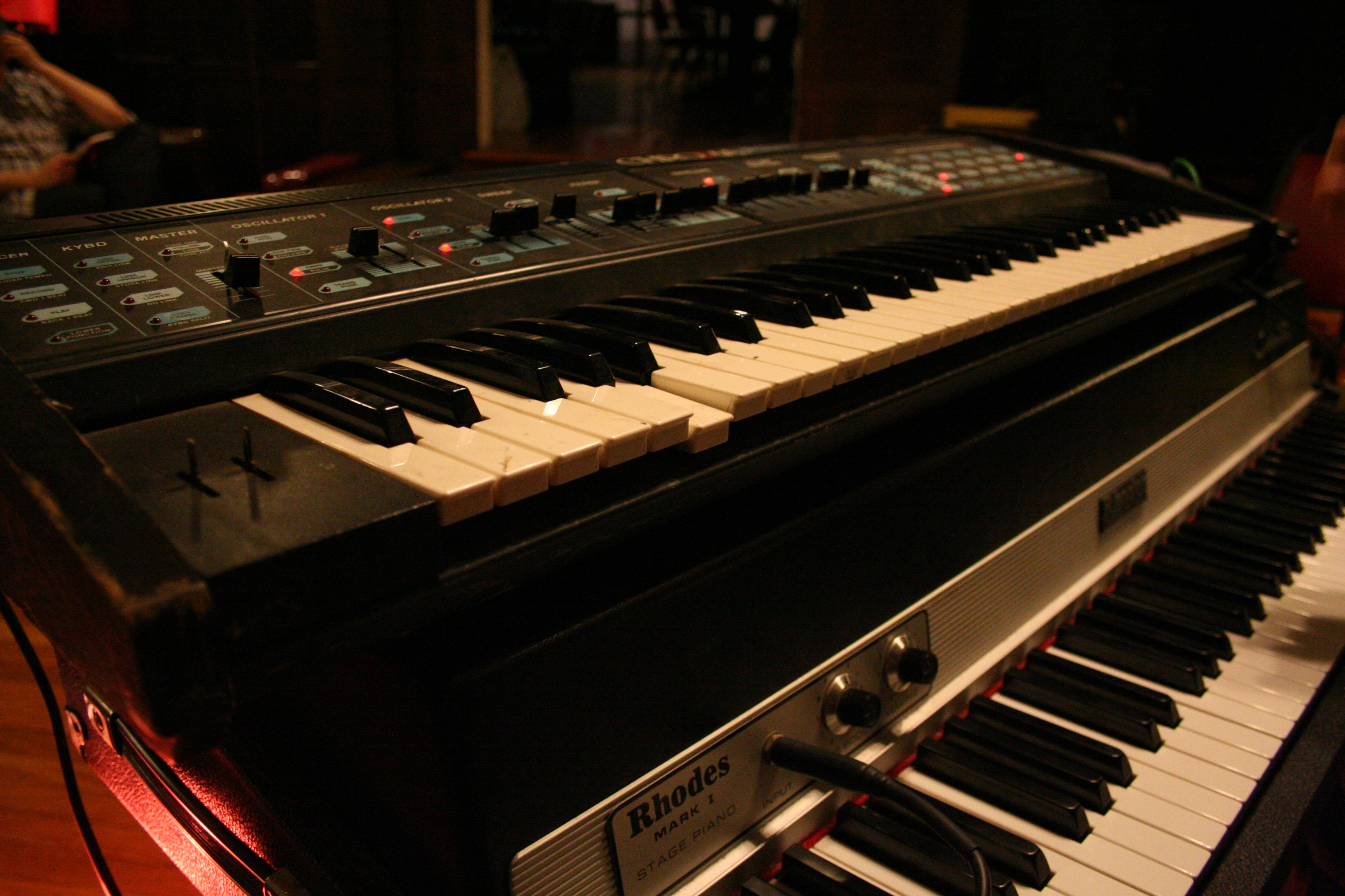 FFMUP - Dec 15, 2009 Chroma Polaris + Fender Rhodes MarkI.